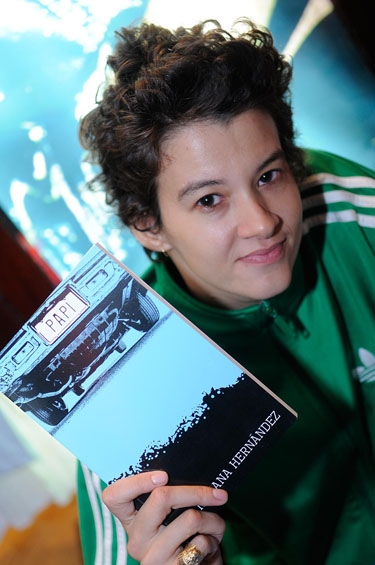 Rita Indiana con unos de sus libros